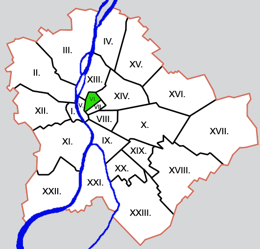 Budapest kerületei: VI. kerület